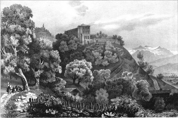 Mont-Fleuri, près de Grenoble (Isère) ; aujourd'hui Montfleury (Corenc) (?)